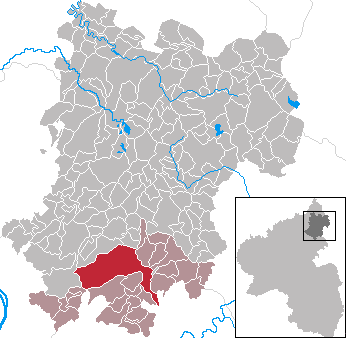 Lage der Verbandsgemeinde Montabaur im Westerwaldkreis